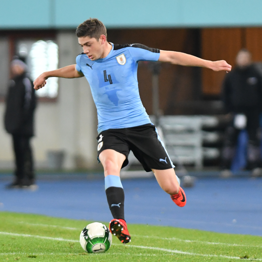 Wien, Österreich, 14.11.2017, Sport, Fussball, OEFB Freundschaftliches Laenderspiel - Österreich vs Uruguay. Bild zeigt Federico Valverde (URU).